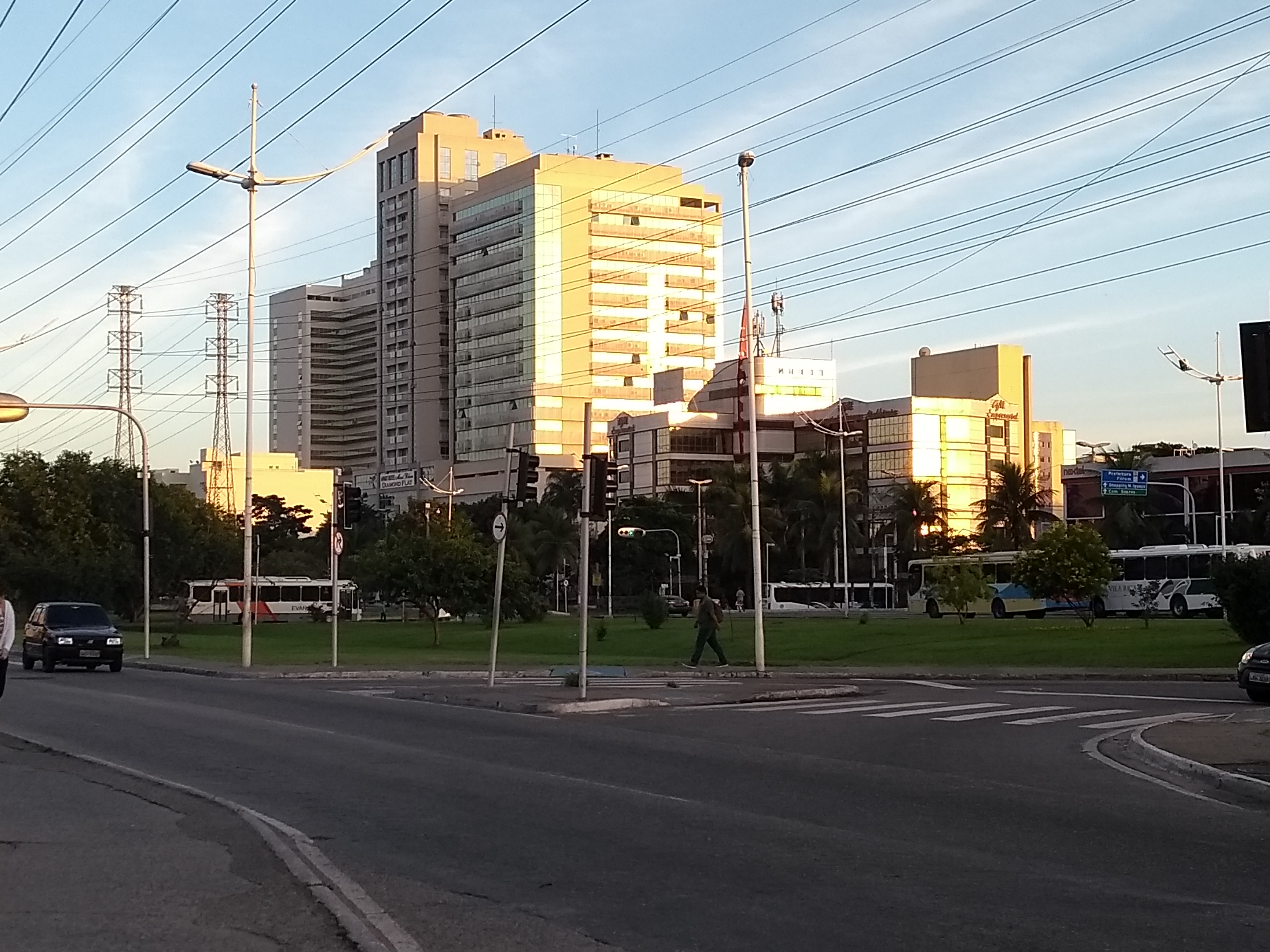 Vista matutina da Via Light, centro de Nova Iguaçu Em destaque, da frente para trás, os edifícios: GM Empresarial, Rossi Via Office, Apart Hotel Mont Blanc Diamond Flat, Top Commerce.